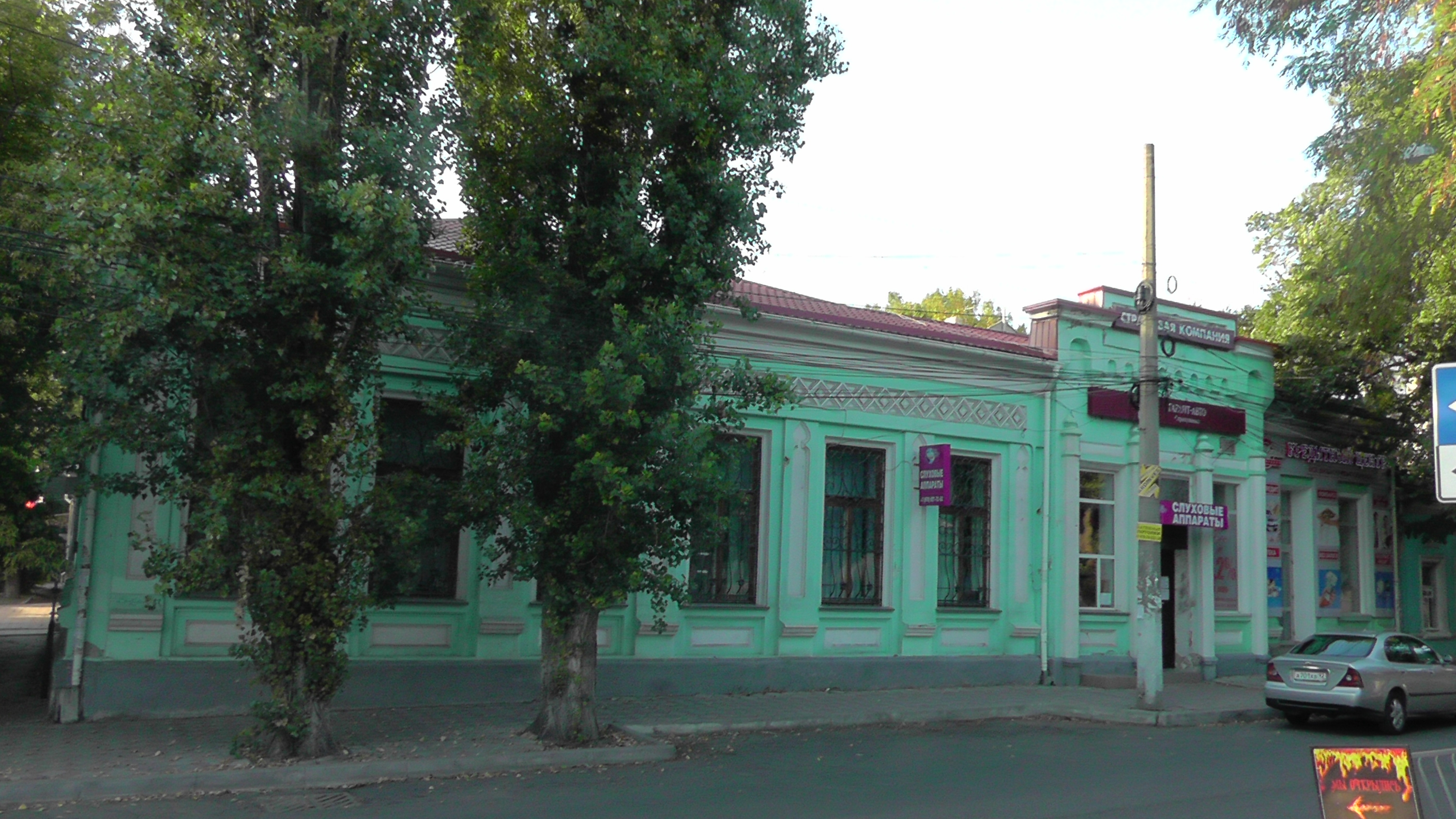 Будинок колишнього товариства взаємного кредиту, Сімферополь, вул. Желябова, 3/11 (ріг Долгоруковської), літ. А, В